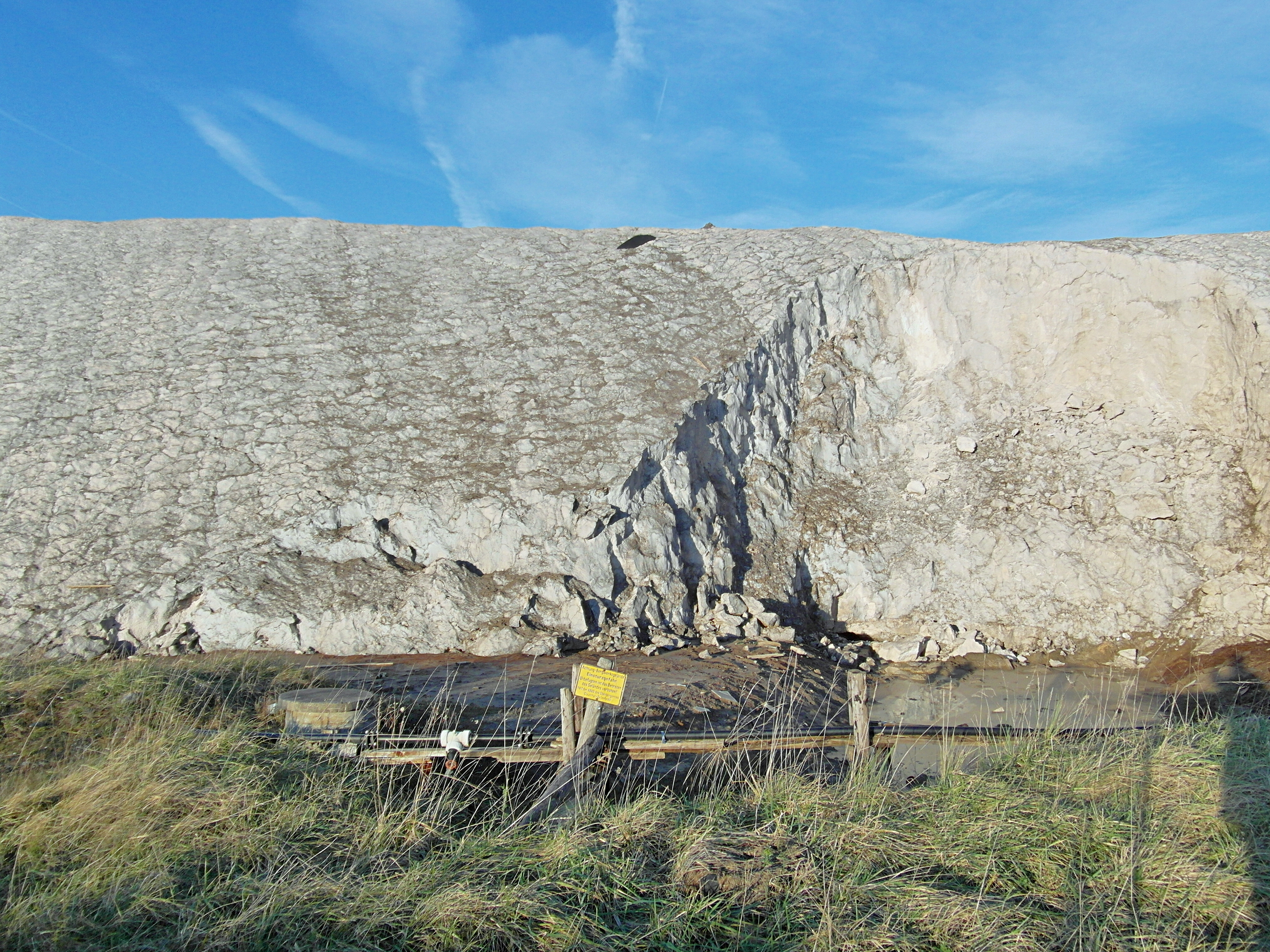 Südflanke der Abraumhalde des Kaliwerks Ronnenberg. Ein Geländestreifen am Fuß der Halde ist als FFH-Gebiet gemeldet.